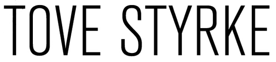 Logo der schwedischen Sängerin Tove Styrke.